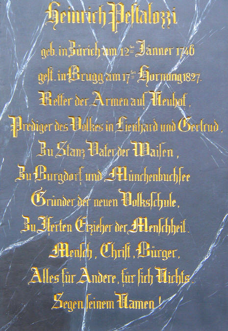 Grabinschrift